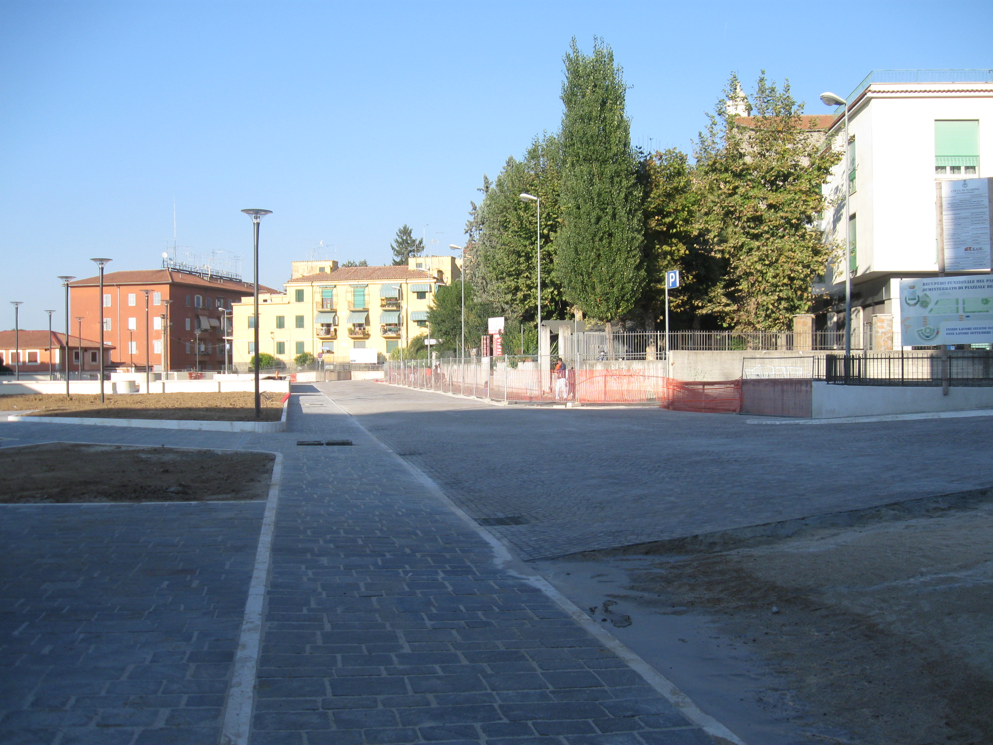 Piazzale degli Eroi a Marino (RM) dopo la risistemazione del 2011